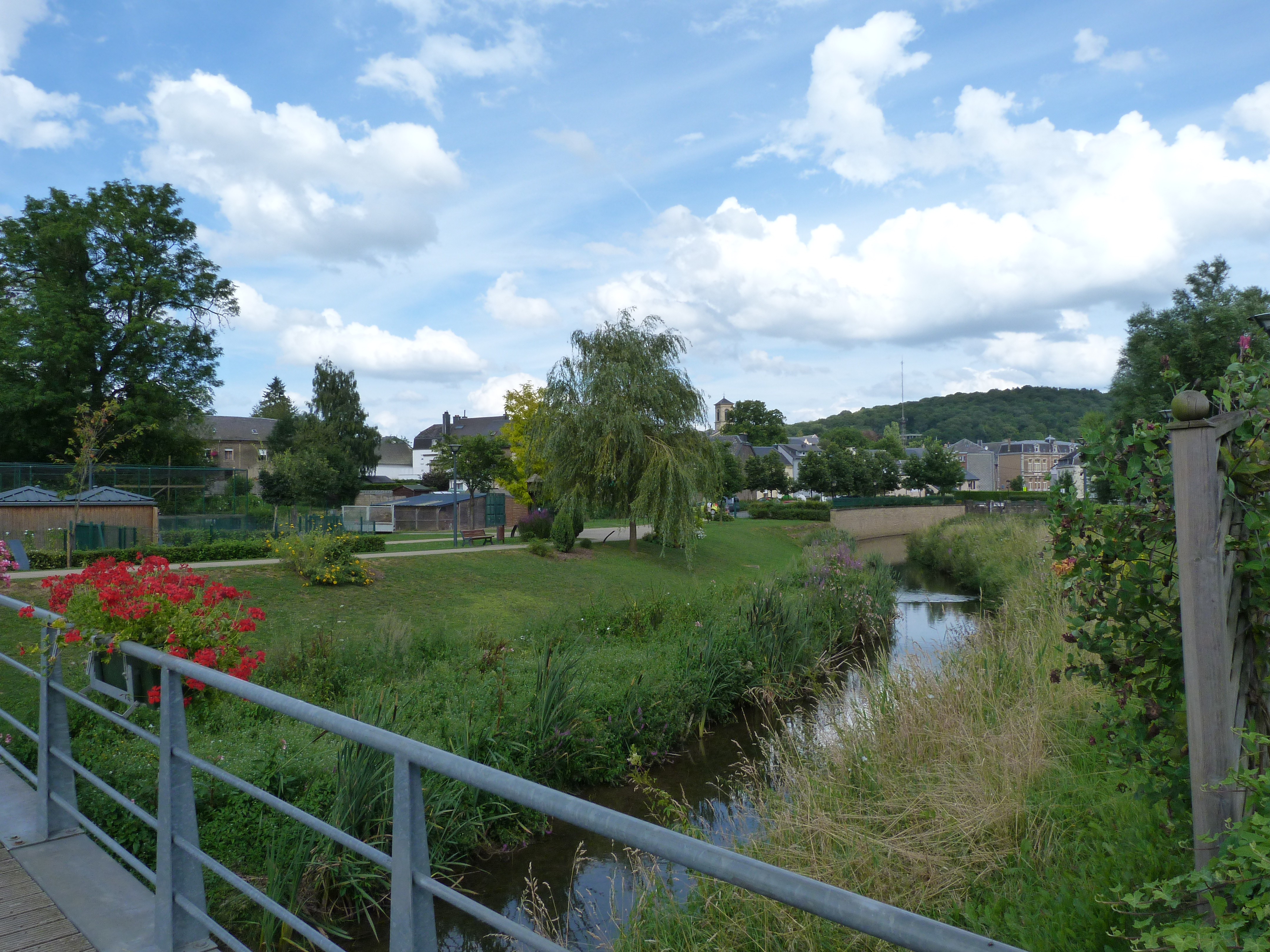 La Chiers coulant dans le parc d'Athus